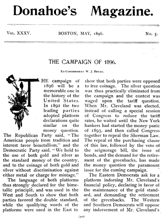 Donahoe's Magazine